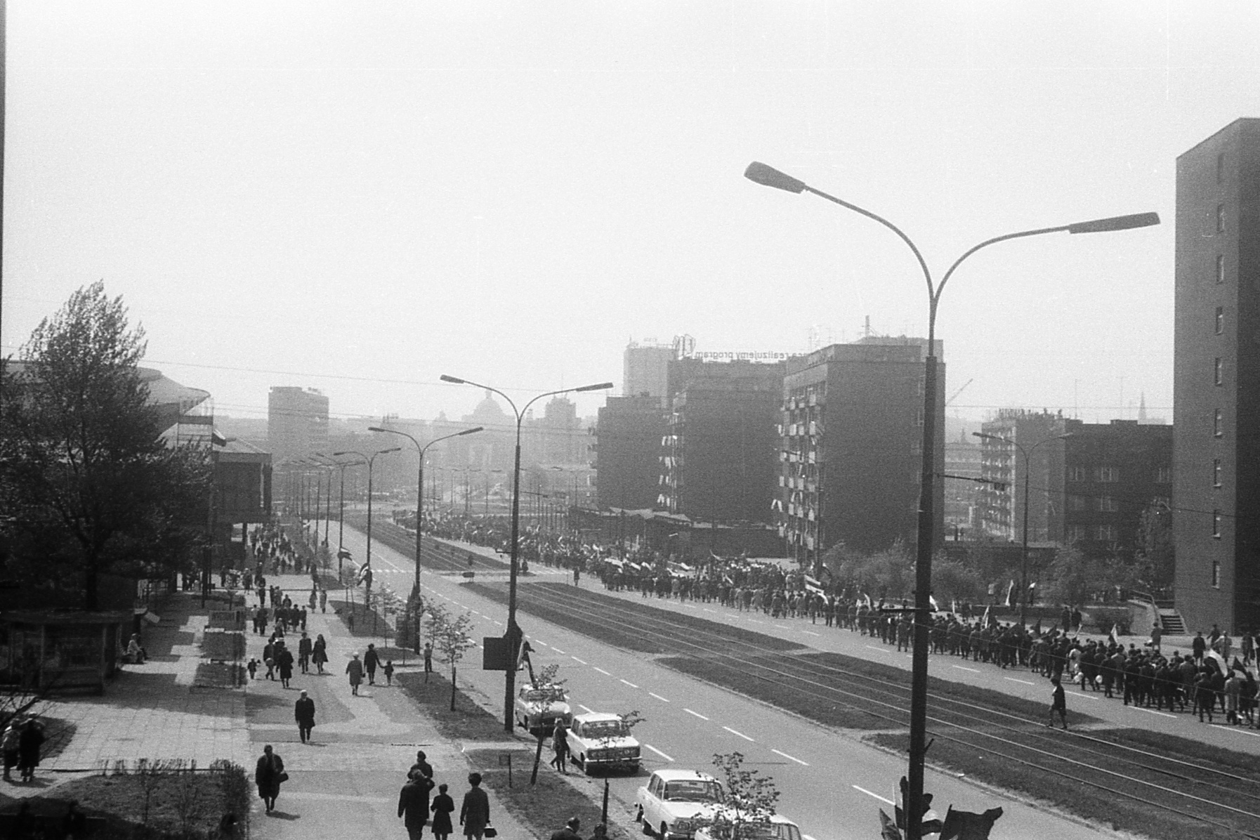 Demonstracja 1-majowa w Katowicach (ul. Armii Czerwonej, dziś al. Wojciecha Korfantego) w 1971 lub 1972. Na drugim planie widoczny po lewej "Spodek" i skrzyżowanie z ul. Morcinka, w oddali słabo widoczne rondo Chorzowska/Roździeńskiego. Fotografia wykonana z okna na I piętrze budynku nr 57 w kierunku południowym.